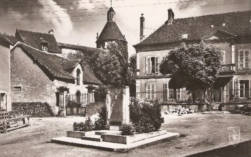 Carte postale d'archive représentant le monument aux maquisards morts de Luzy (Nièvre, France).